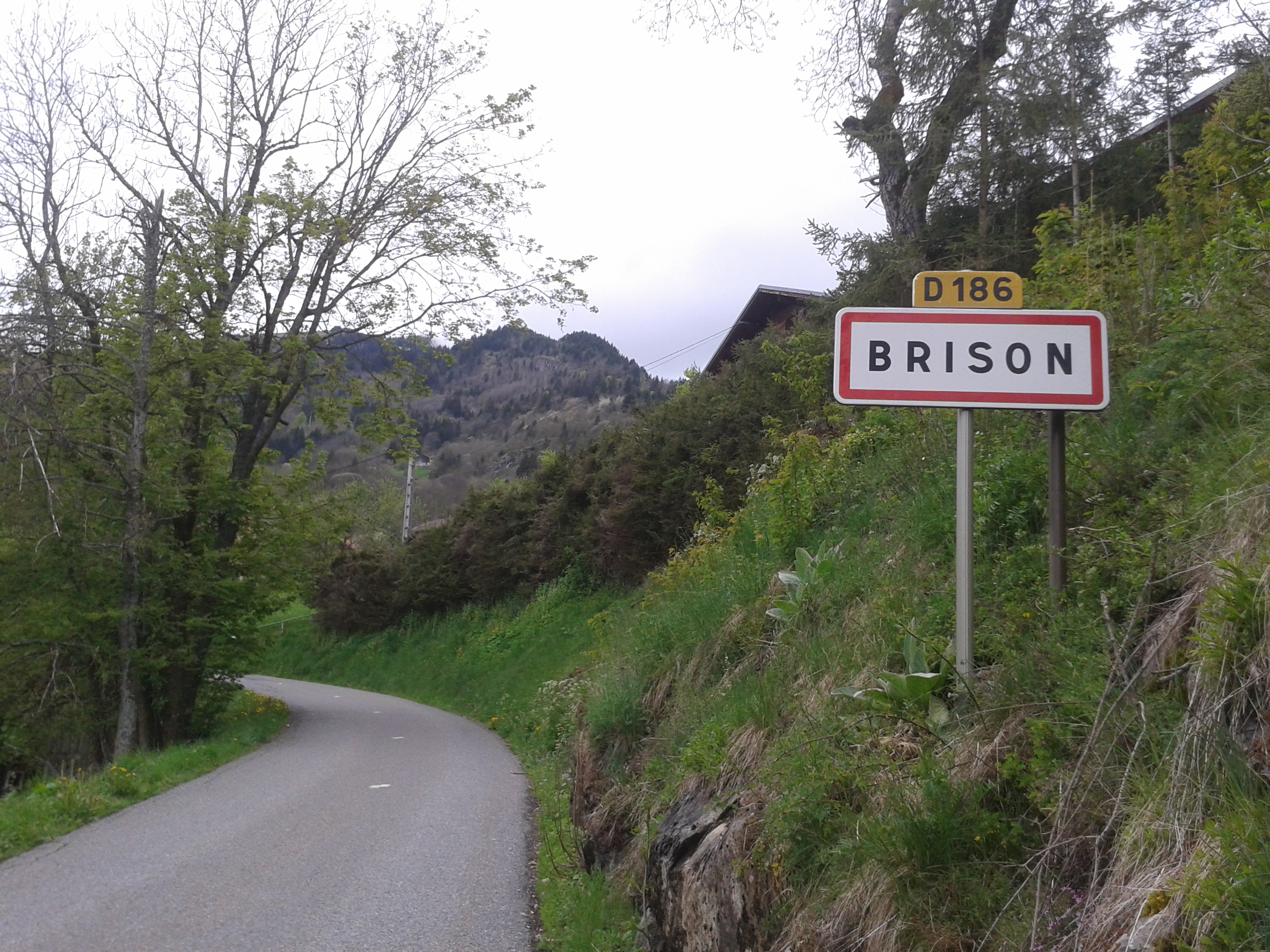 Entrée de Brison par la D186.